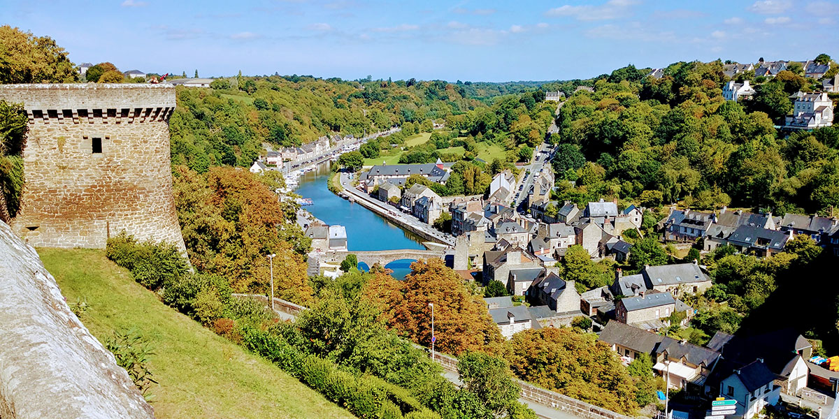 El rio Rance pasando por Dinan visto desde las murallas del Jardin Ingles.